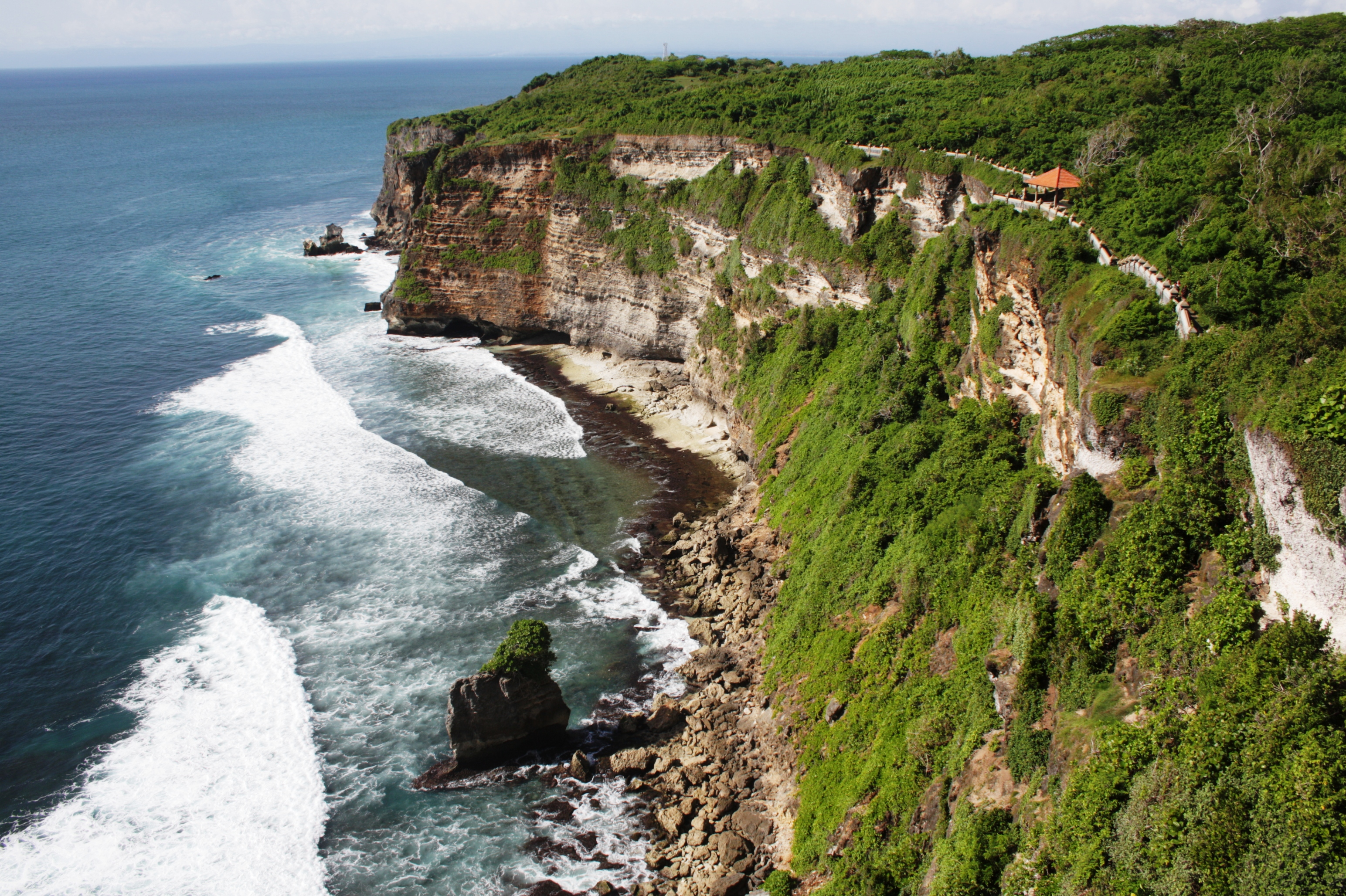 View from Pura Luhur Ulu Watu, Bali (March 2009)